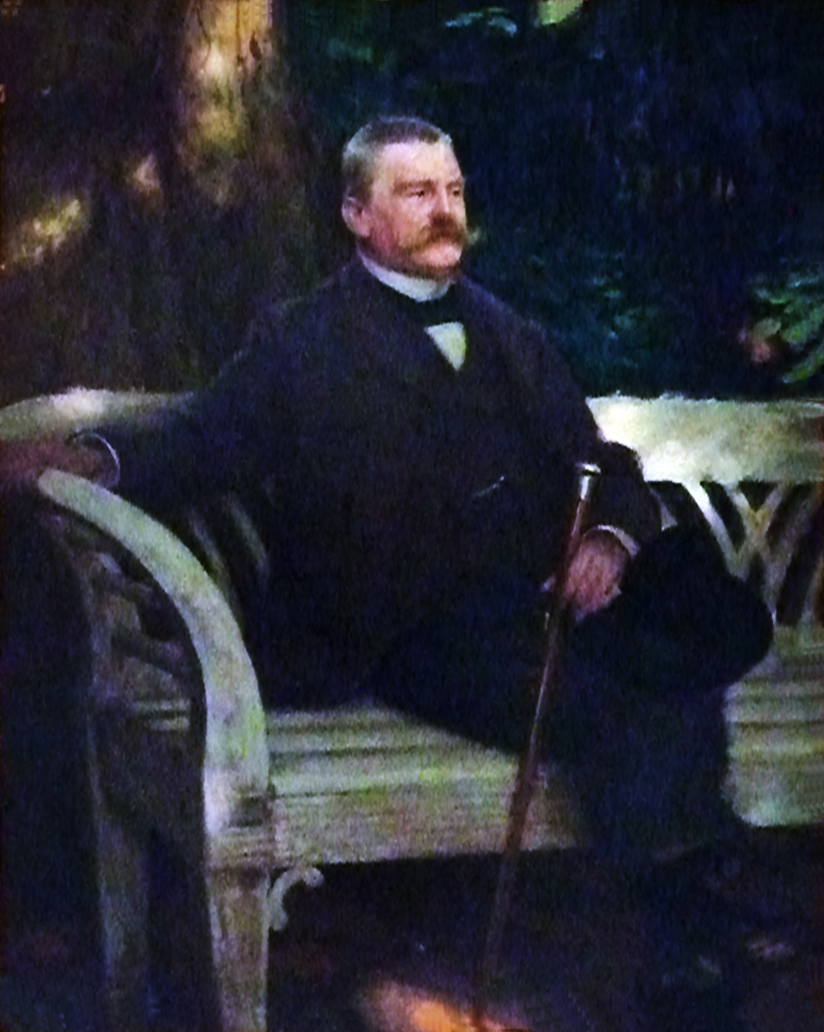 Detlev von Liliencron,1904 von Hans Olde. Öl auf Leinwand. Kunsthalle Kiel. Erworben 1913 vom Künstler durch die Lange-Stiftung.